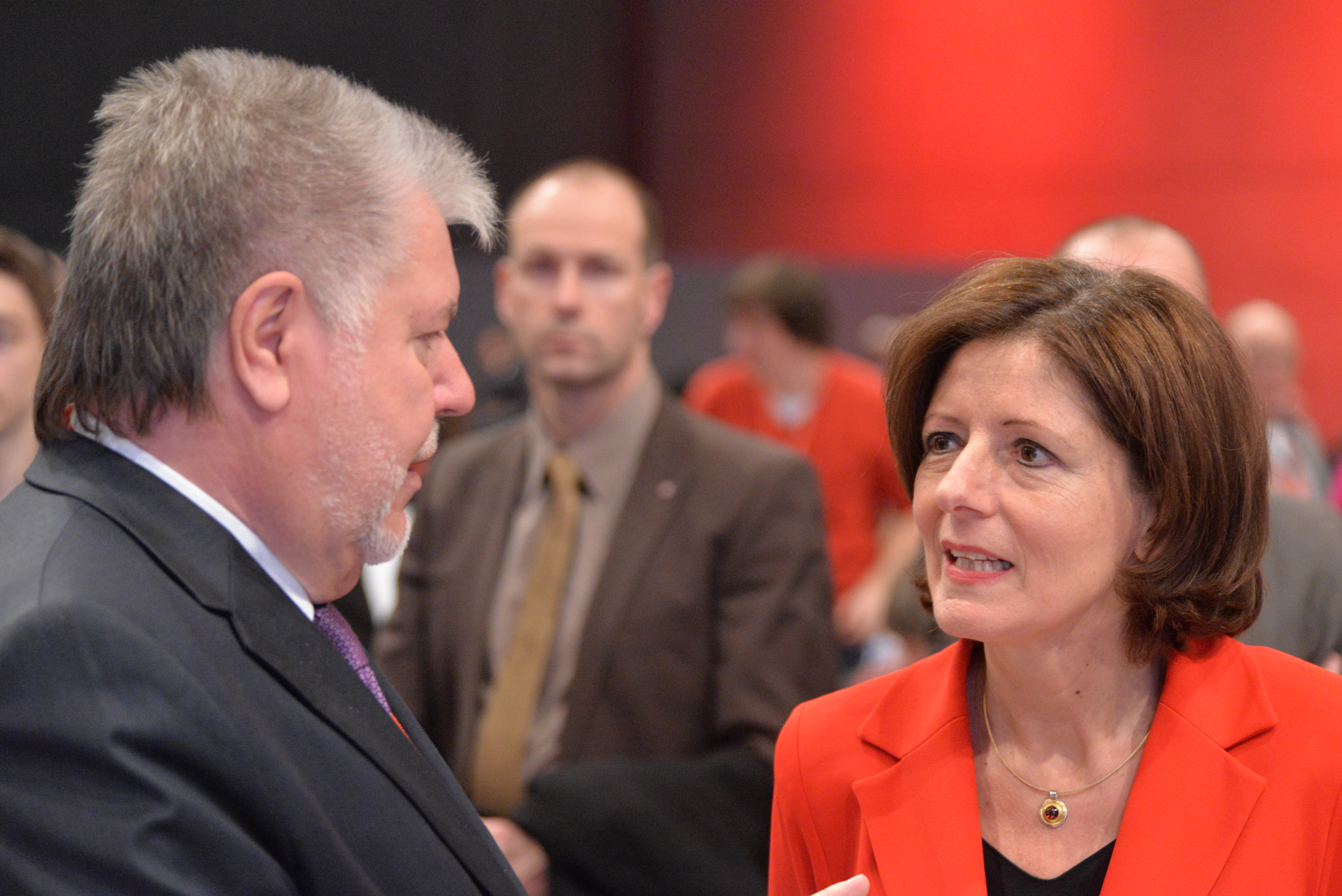 SPD Bundesparteitag Berlin, 10.-12. Dezember 2015, CityCube, Messe Berlin